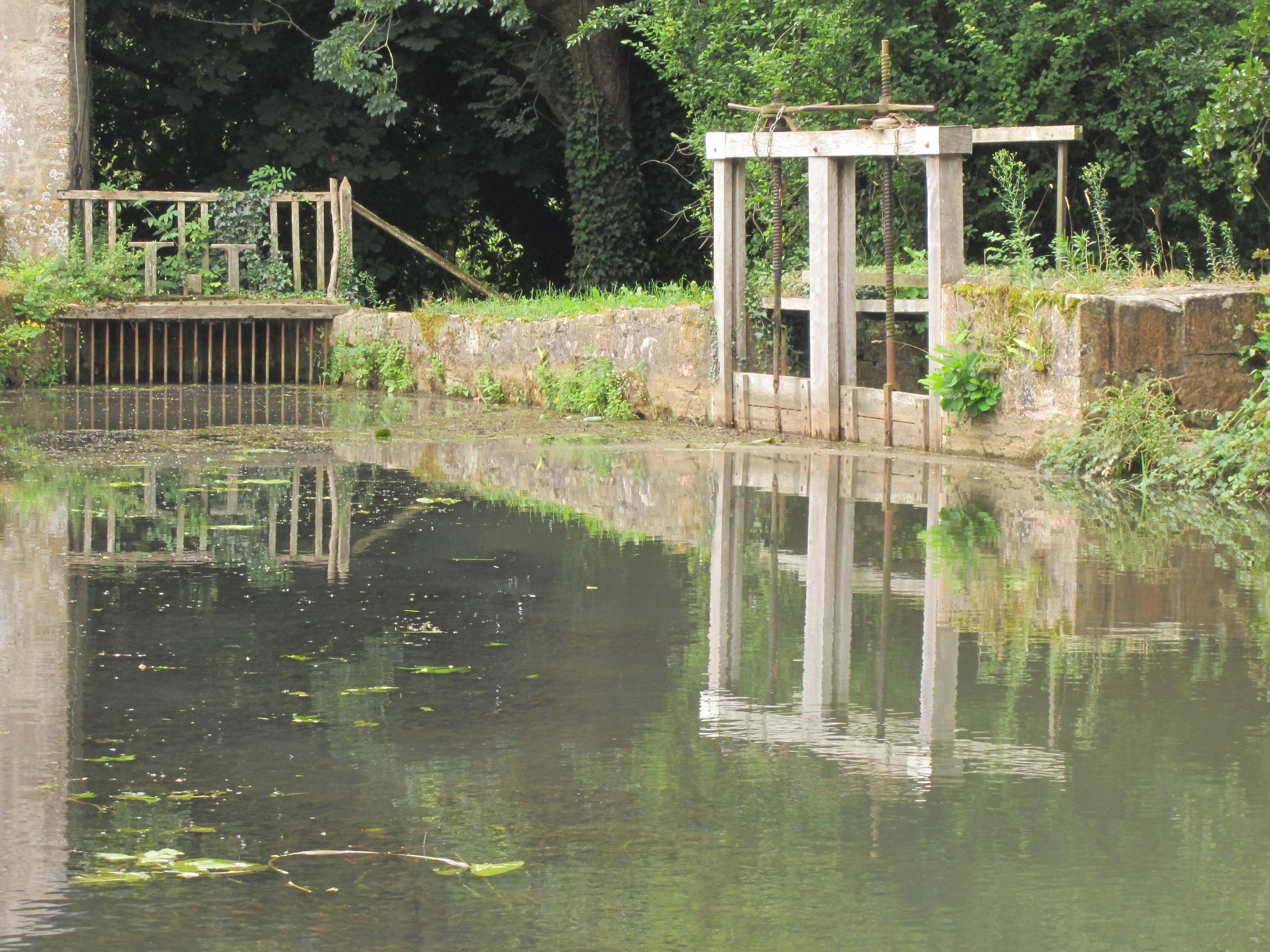 Moulin de Négreville, Petit moulin à farine désaffecté, vraisemblablement du 18e siècle, .